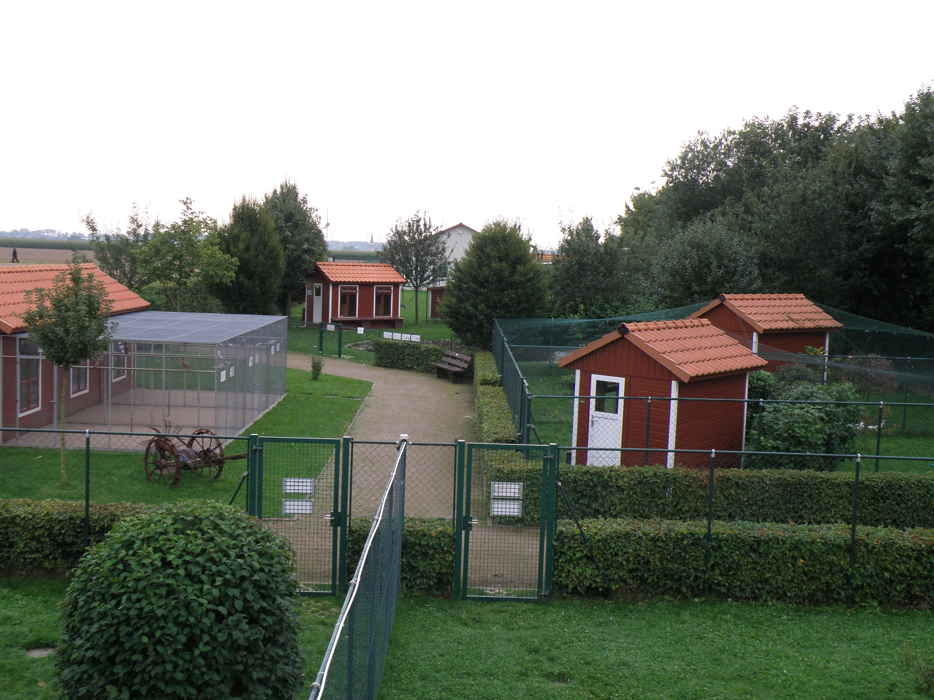 Das Gelände des Wissenschaftlichen Geflügelhofs des BDRG